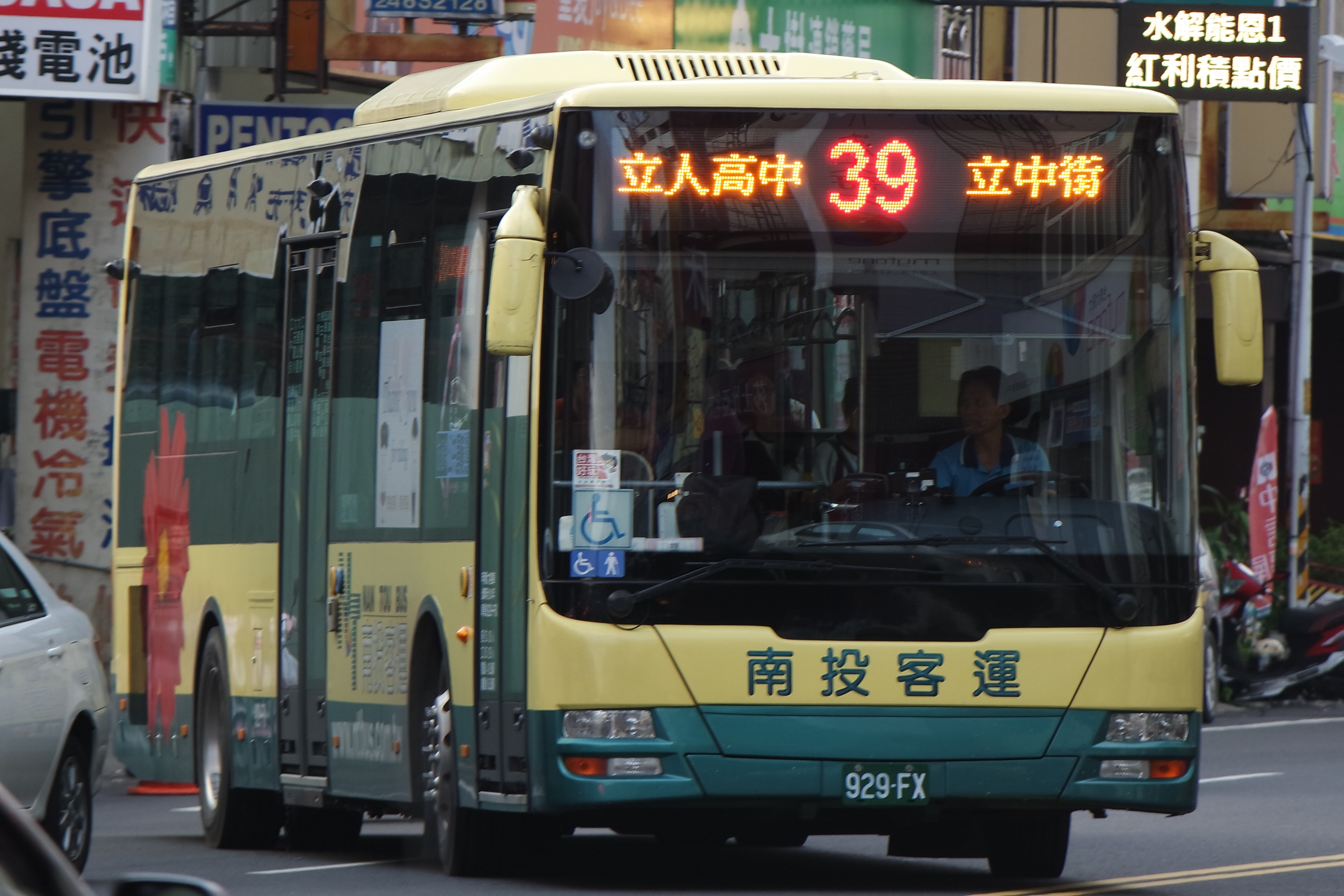 中文（台灣）: 南投客運三門GOLDEN DRAGON黃金龍低地板大客車929-FX行駛台中市公車39路